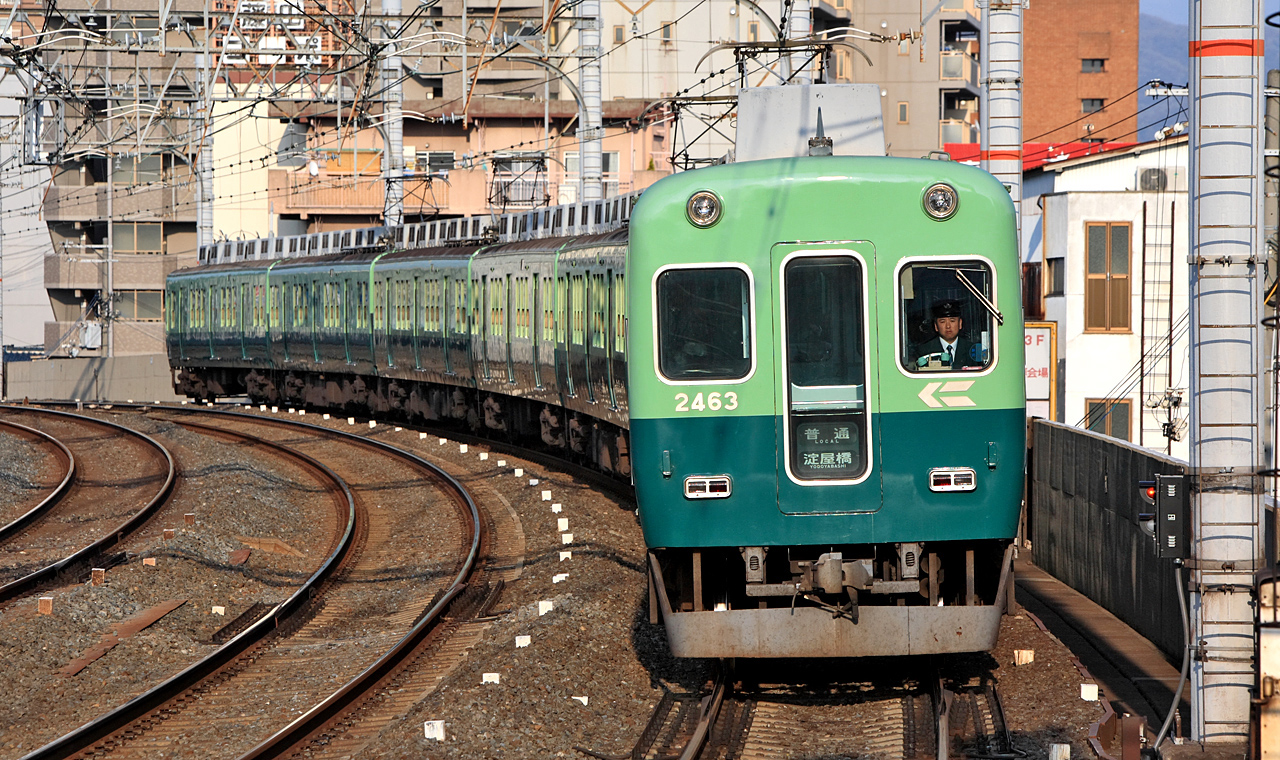 Keihan 2400 Series EMU